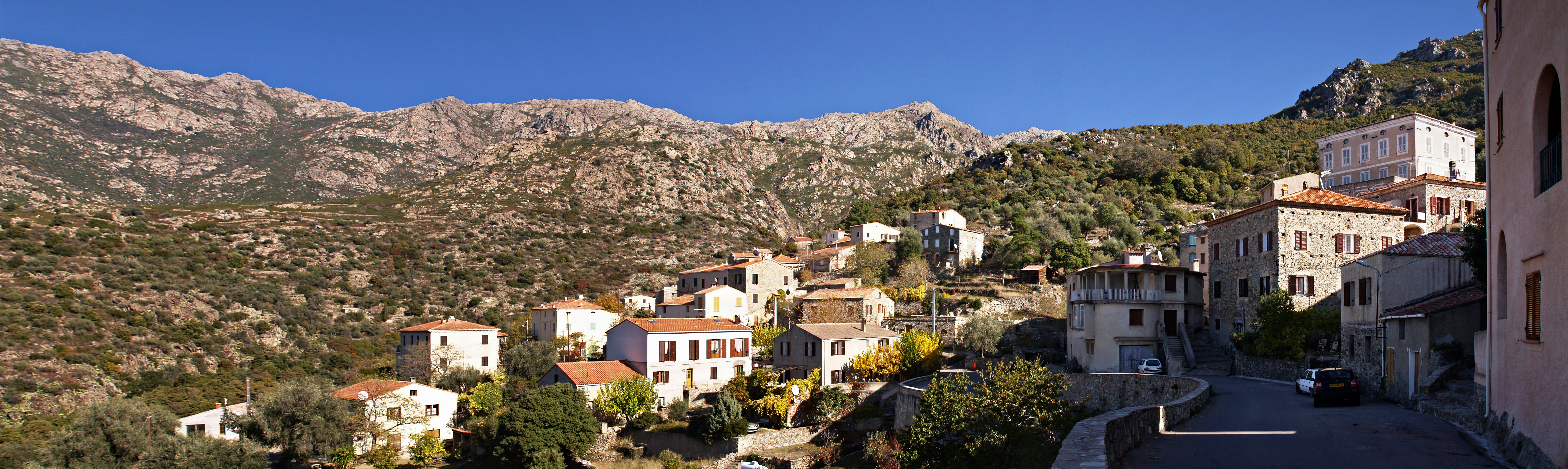 Urtaca (Corse) - Panorama du village Corsu: Urtaca (Corsica) - Paisagiu di Urtaca